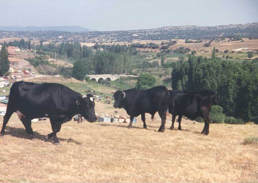 FERIA DE GANADO EN VILLAFRANCA DE LA SIERRA (13 DE JULIO DE 1986) (AVILA, ESPAÑA)